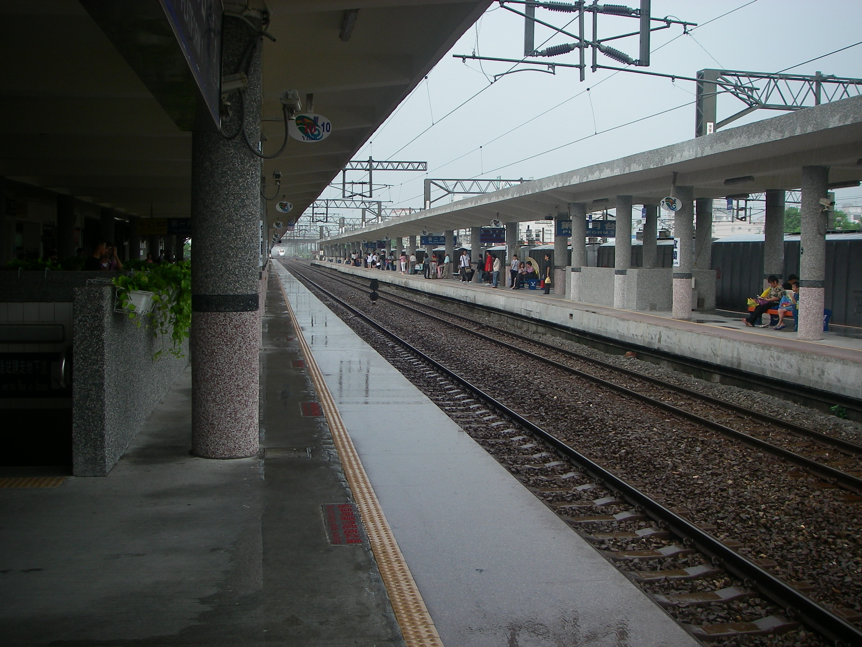 宜蘭站月臺。原有的月臺雨棚今已改建。